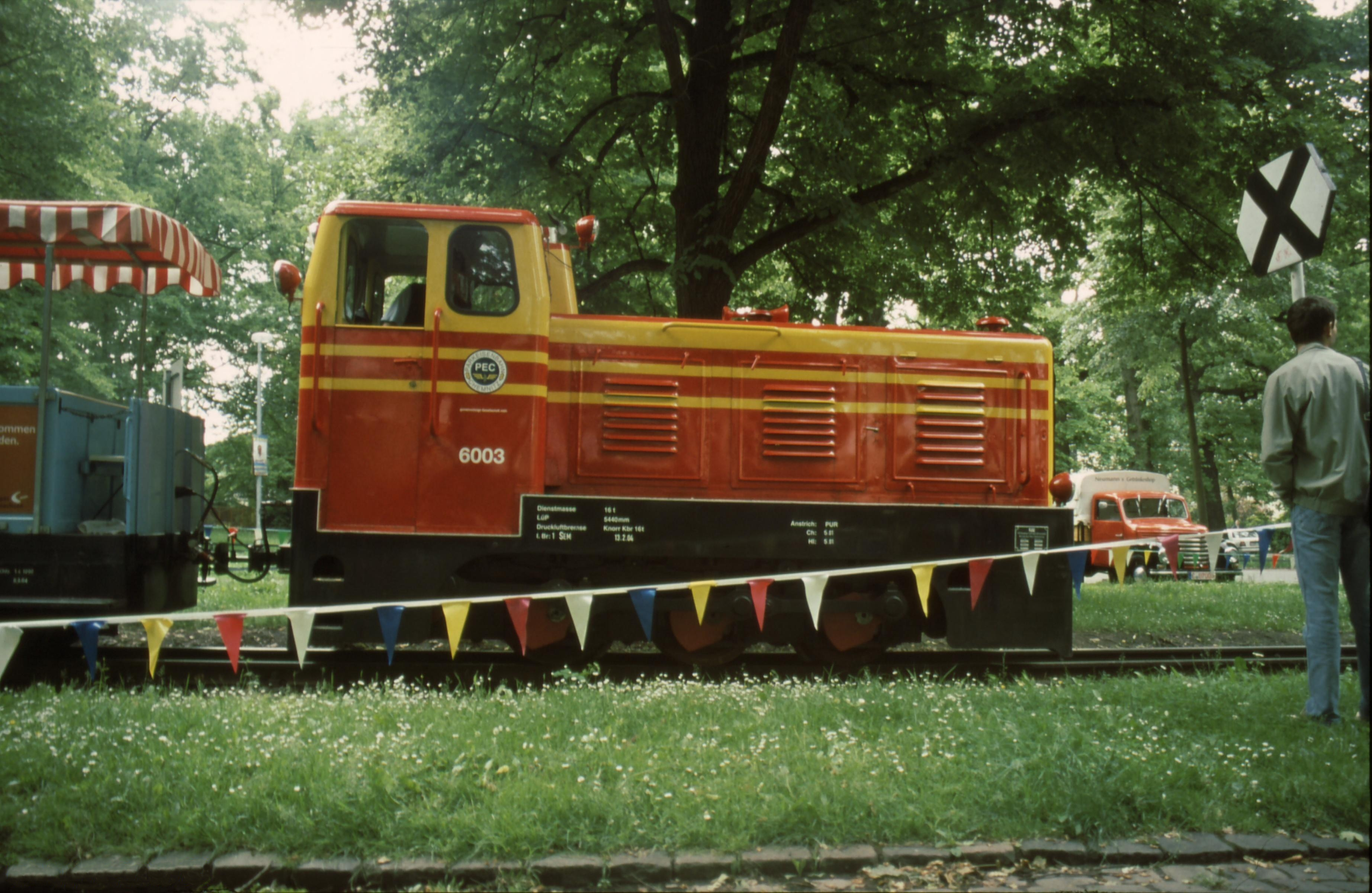 Die Lok 6003 wartet auf den Beginn der Fahrzeugparade im Juni 2004